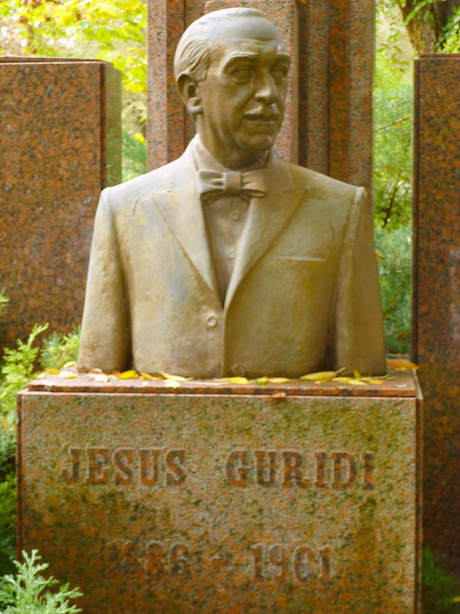 Monumento a Jesús Guridi (Vitoria)